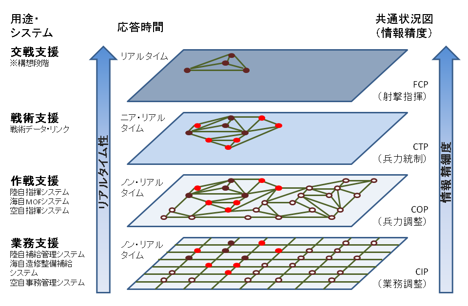 自衛隊のC4Iシステムの構成の概要と特性を示したシェーマ。